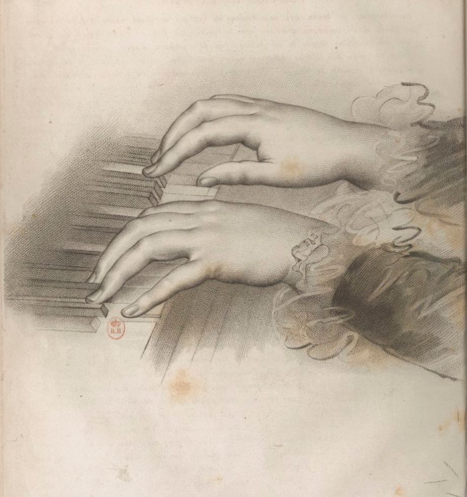 La position des mains sur le clavier. Gravure extraite du Cours complet pour l'enseignement du forte piano d'Hélène de Montgeroult (1764–1836) publié vers. Paris: Launer, n.d., ca.1830.